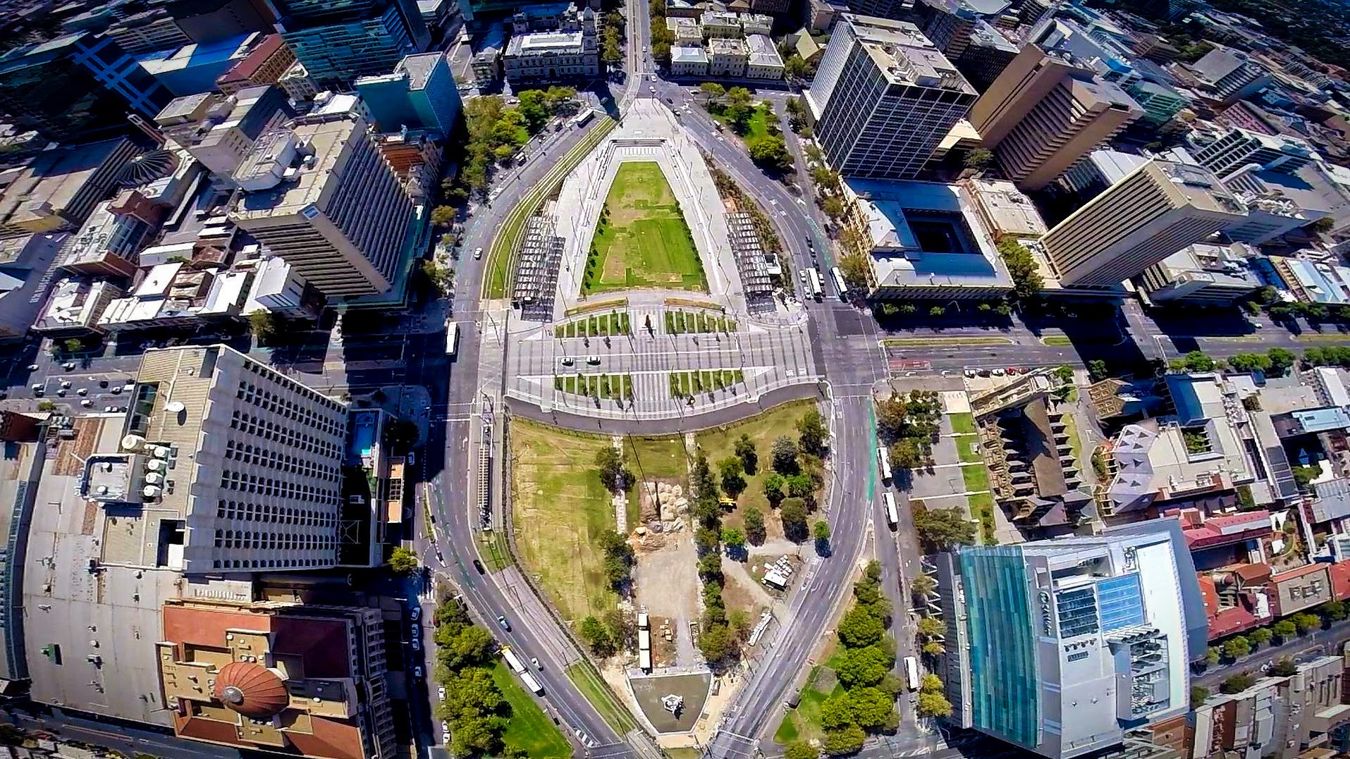 Transformers - Victoria Square Adelaide SA